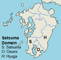 Kaart van het Satsuma Domein in 1550. Zelf ontworpen ter illustratie.